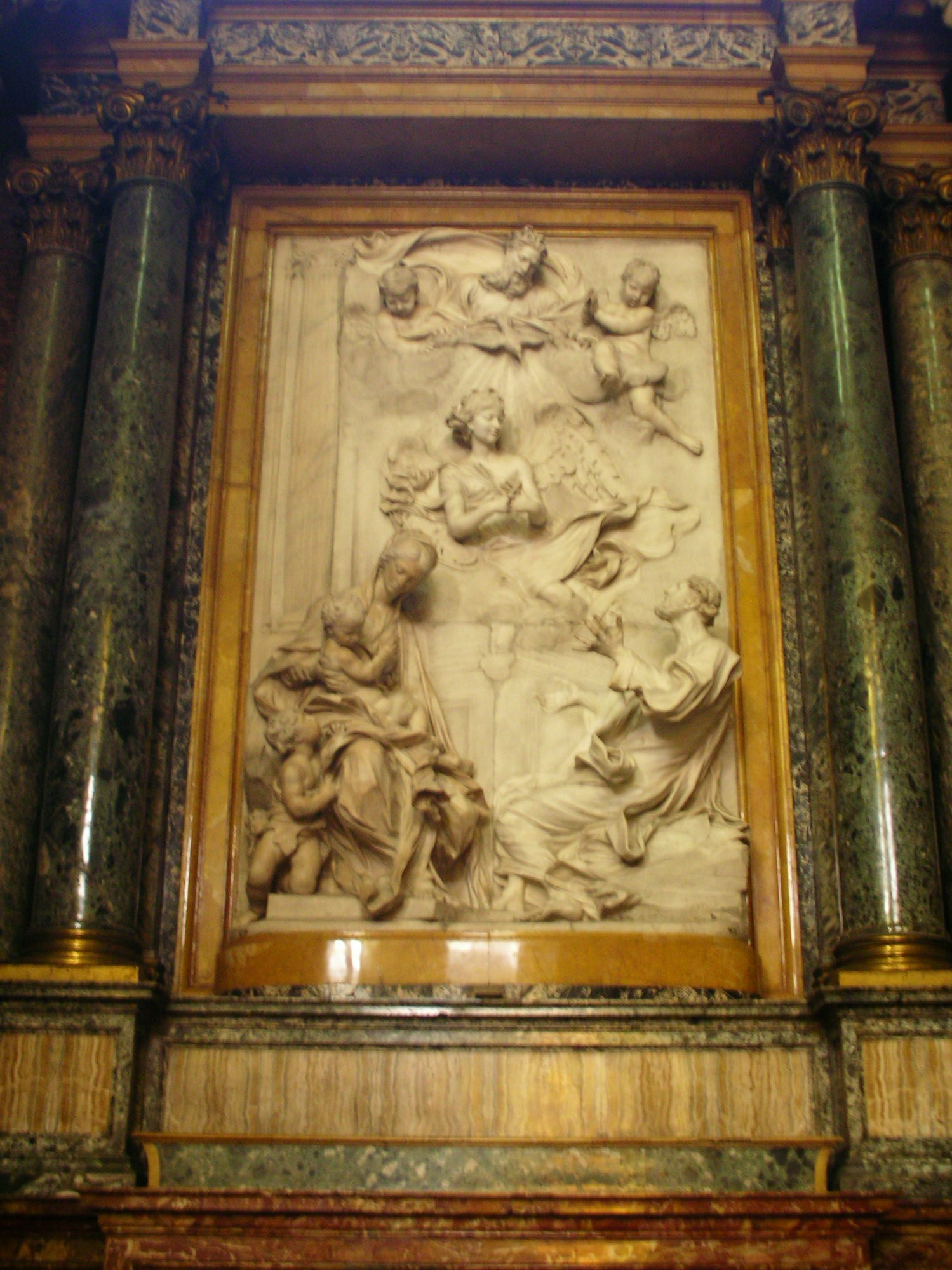 Lancellotti chapel "L'Angelo annuncia alla Sacra famiglia la fuga in Egitto" (by A. Raggi), Sant'Andrea della Valle, Rome